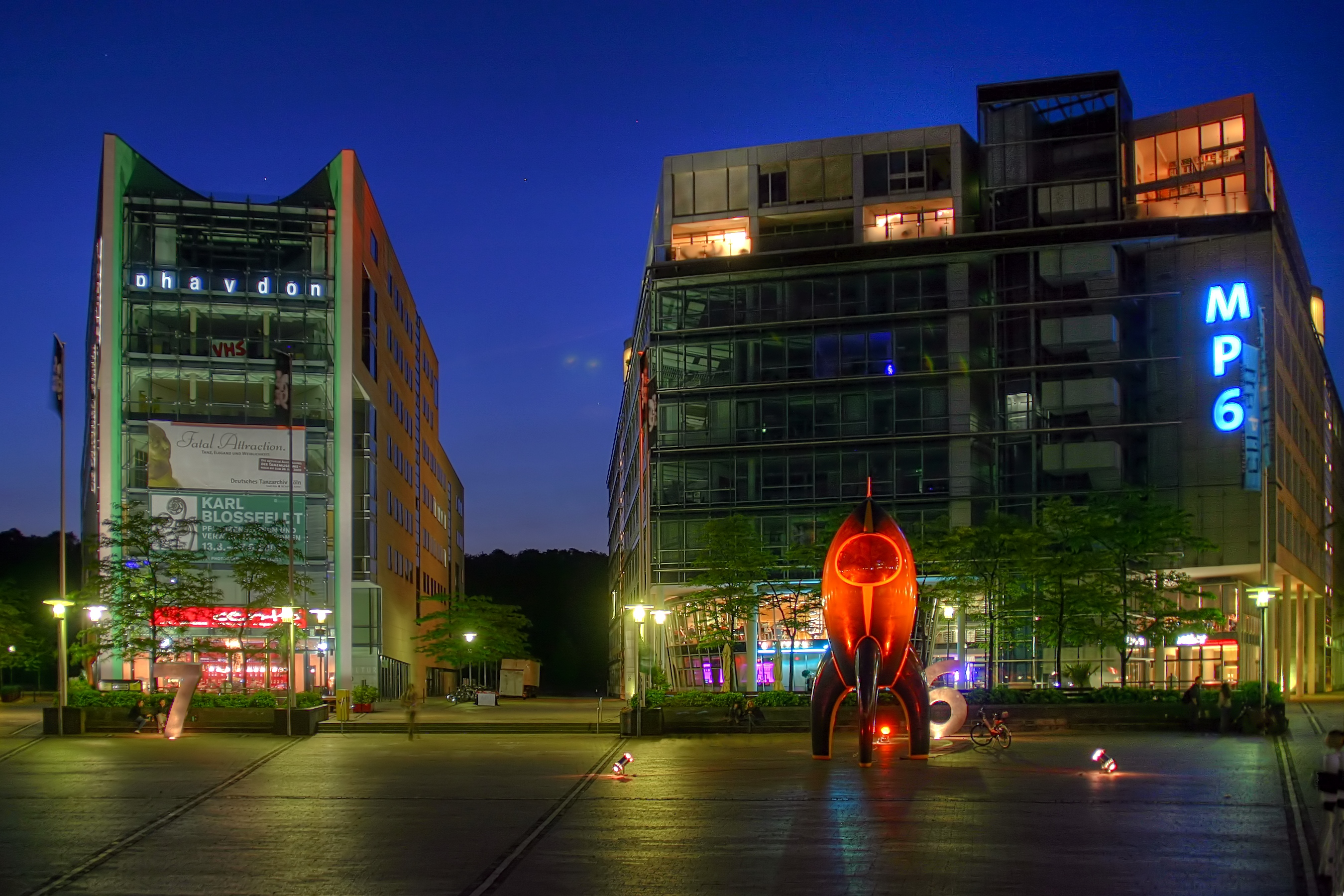 Mediapark Häuser 6 und 7 mit der Rakete des CCC zur SIGINT